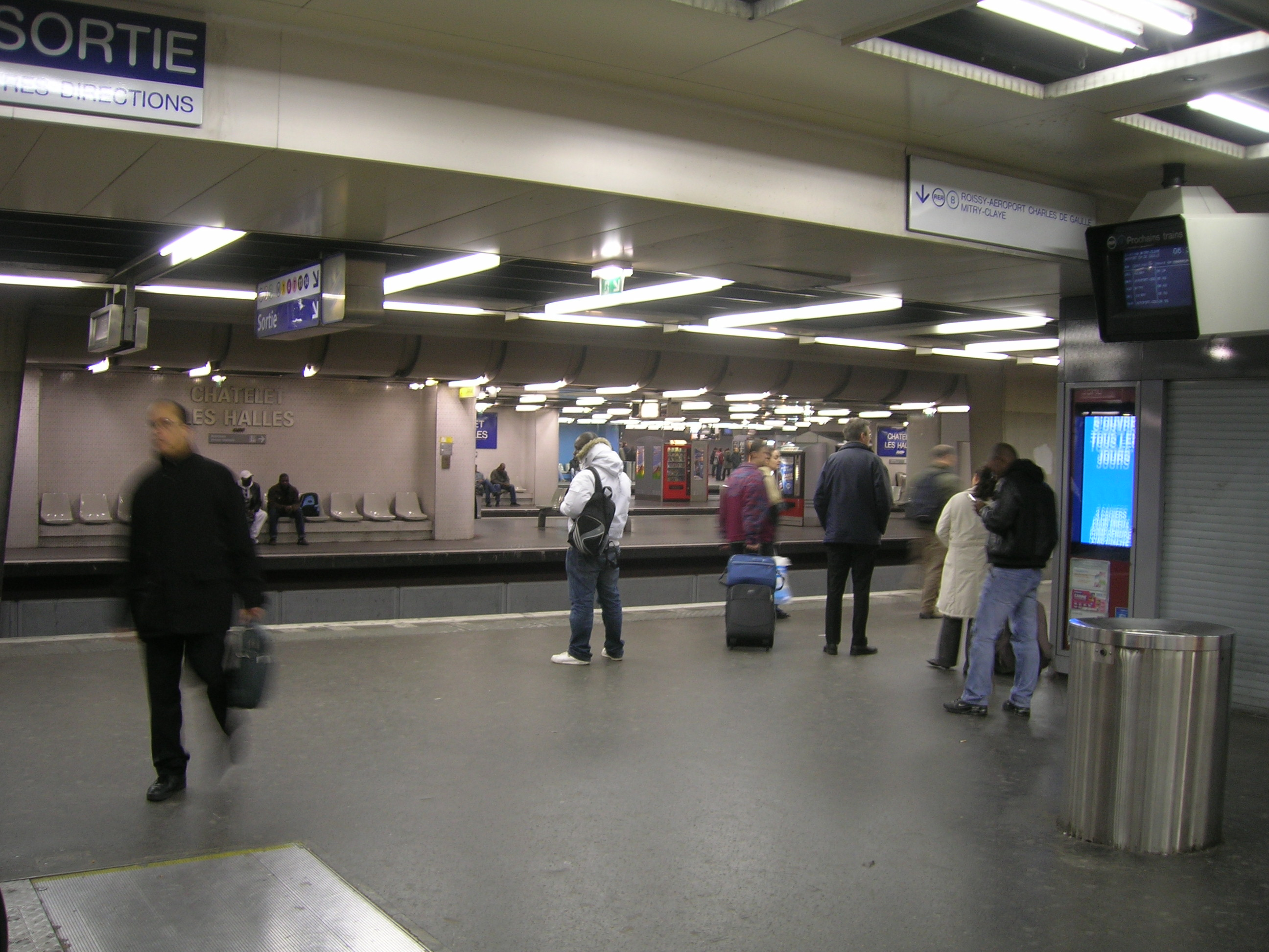 Châtelet - Les Halles, Paris, France